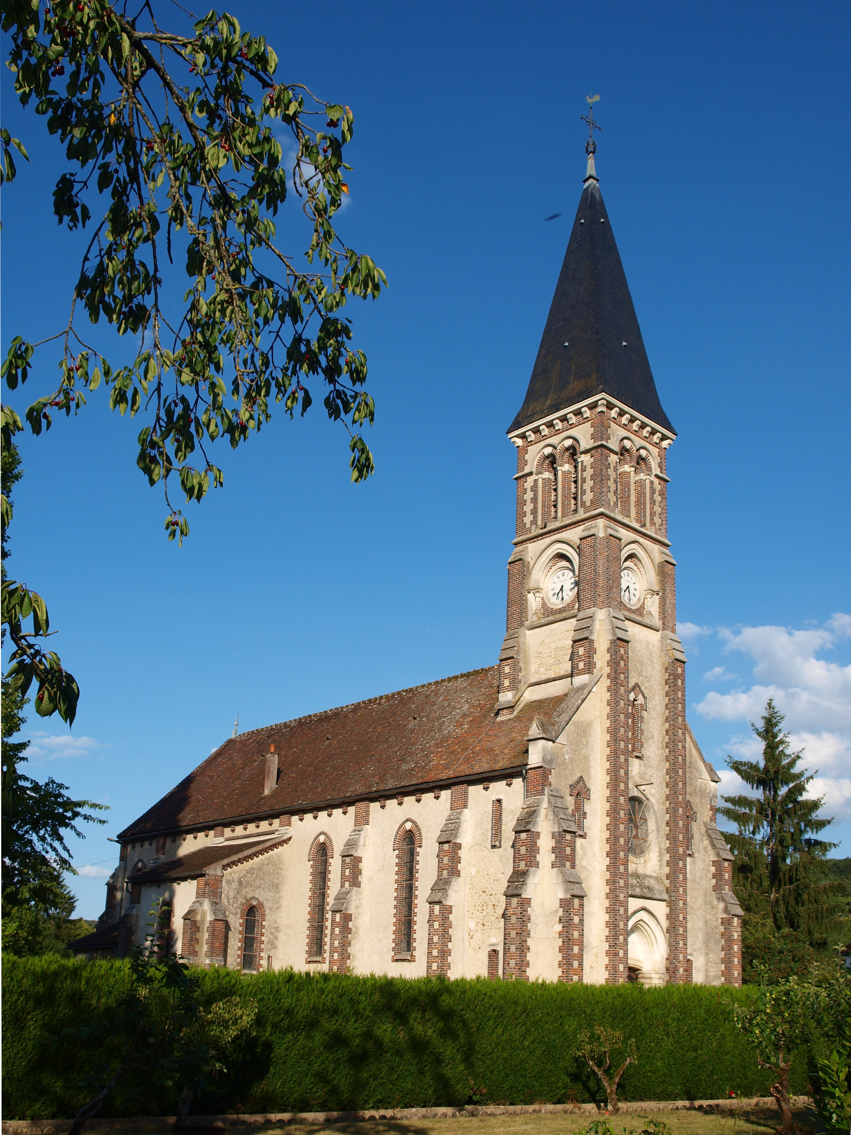 Armeau (Yonne, France) ; l'église